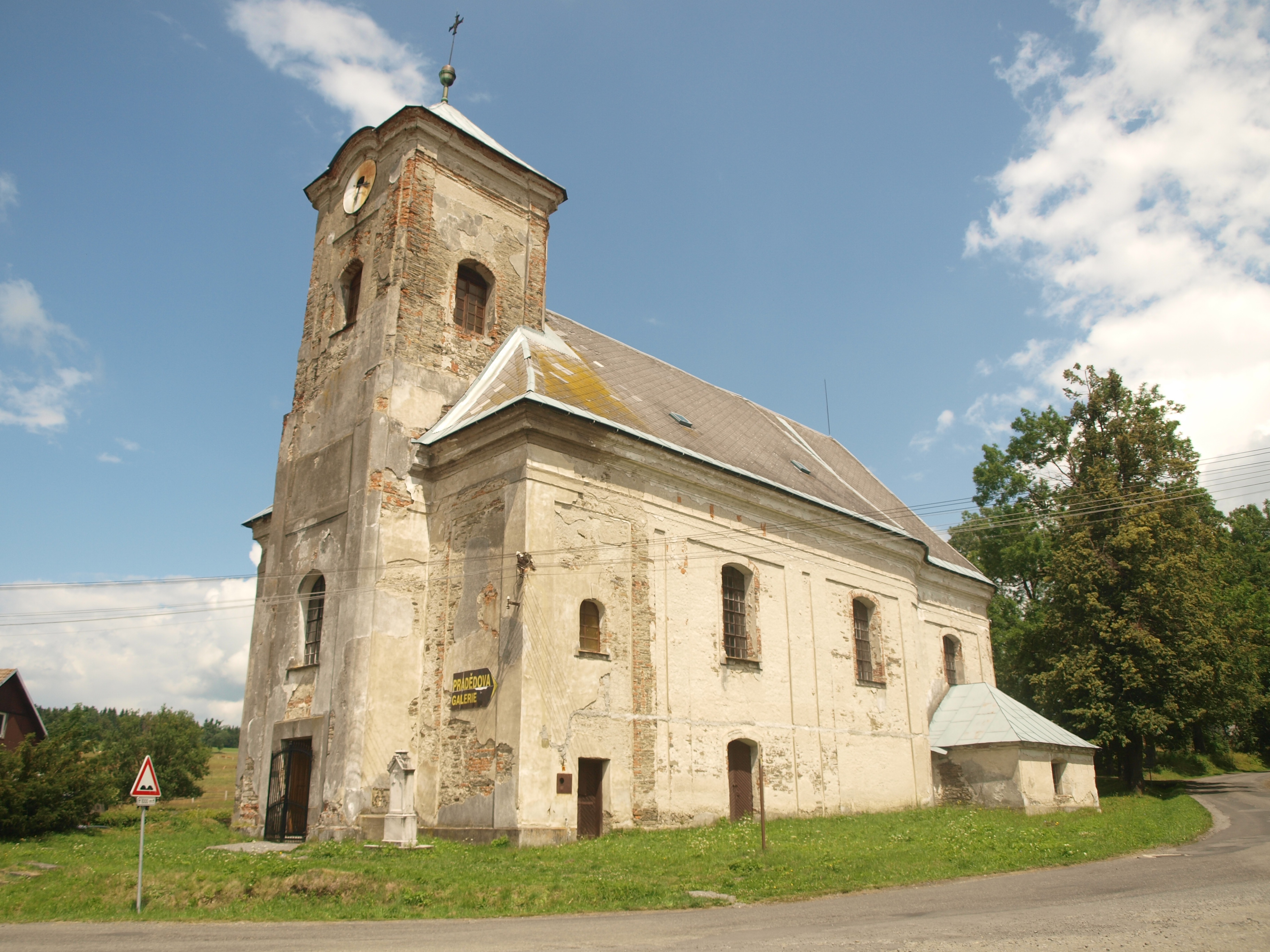 Kostel v Jiříkově na Bruntálsku